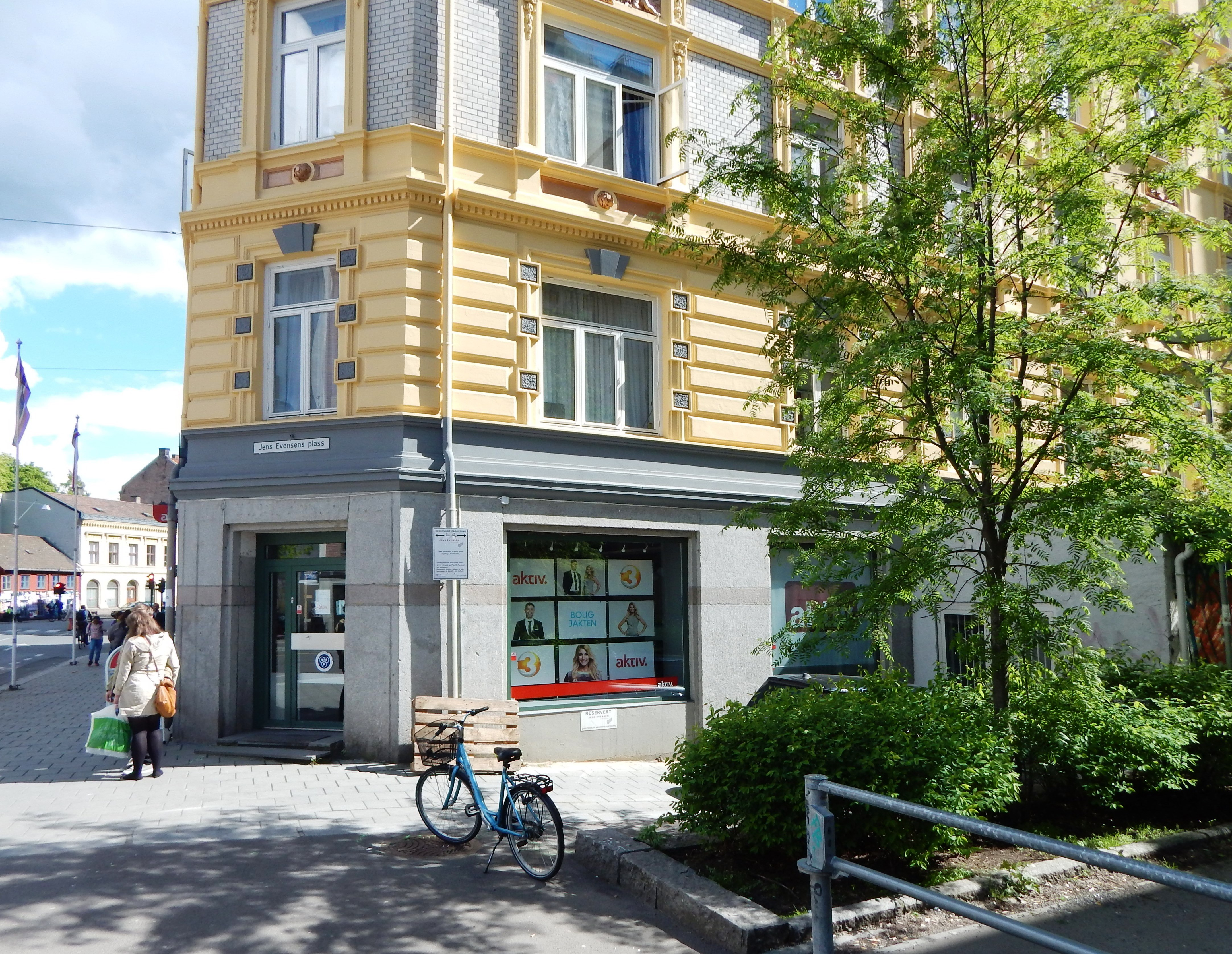 Jens Evensens plass ved hjørnet Grønlandsleiret/Margit Hansens gate på Grønland